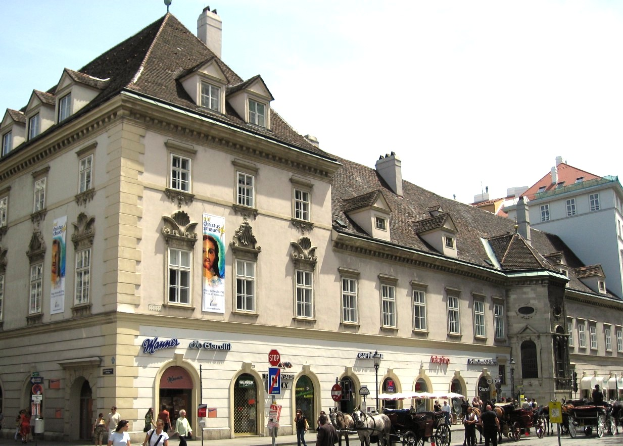 Wien Erzbischöfliches Palais